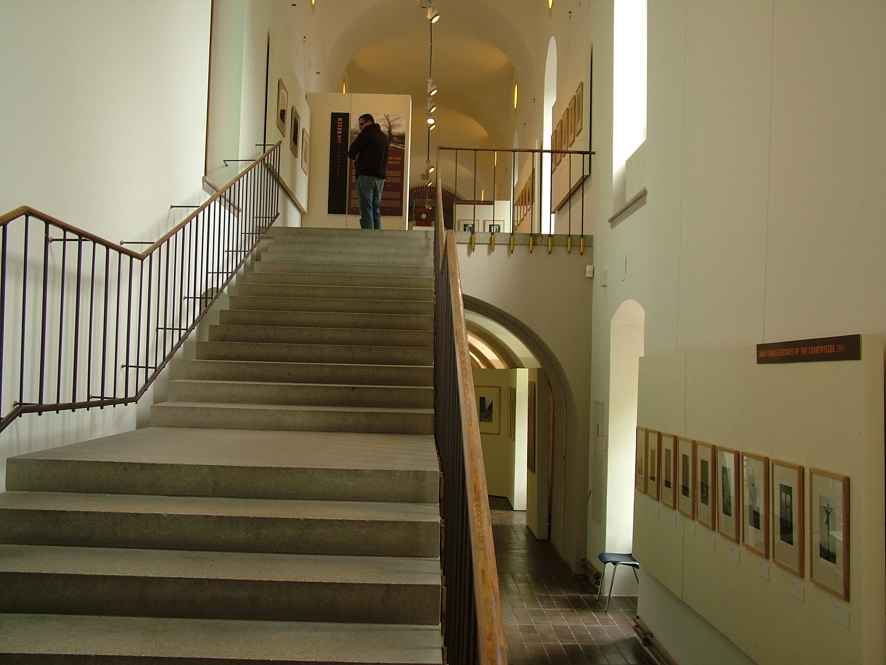 „Jan Reich – Fotografie: Životní příběh fotografa narozeného roku 1942 v Praze“, výstava fotografií, Datum konání: 25. 4. 2012 - 19. 8. 2012 Místo konání: Tereziánské křídlo Starého královského paláce